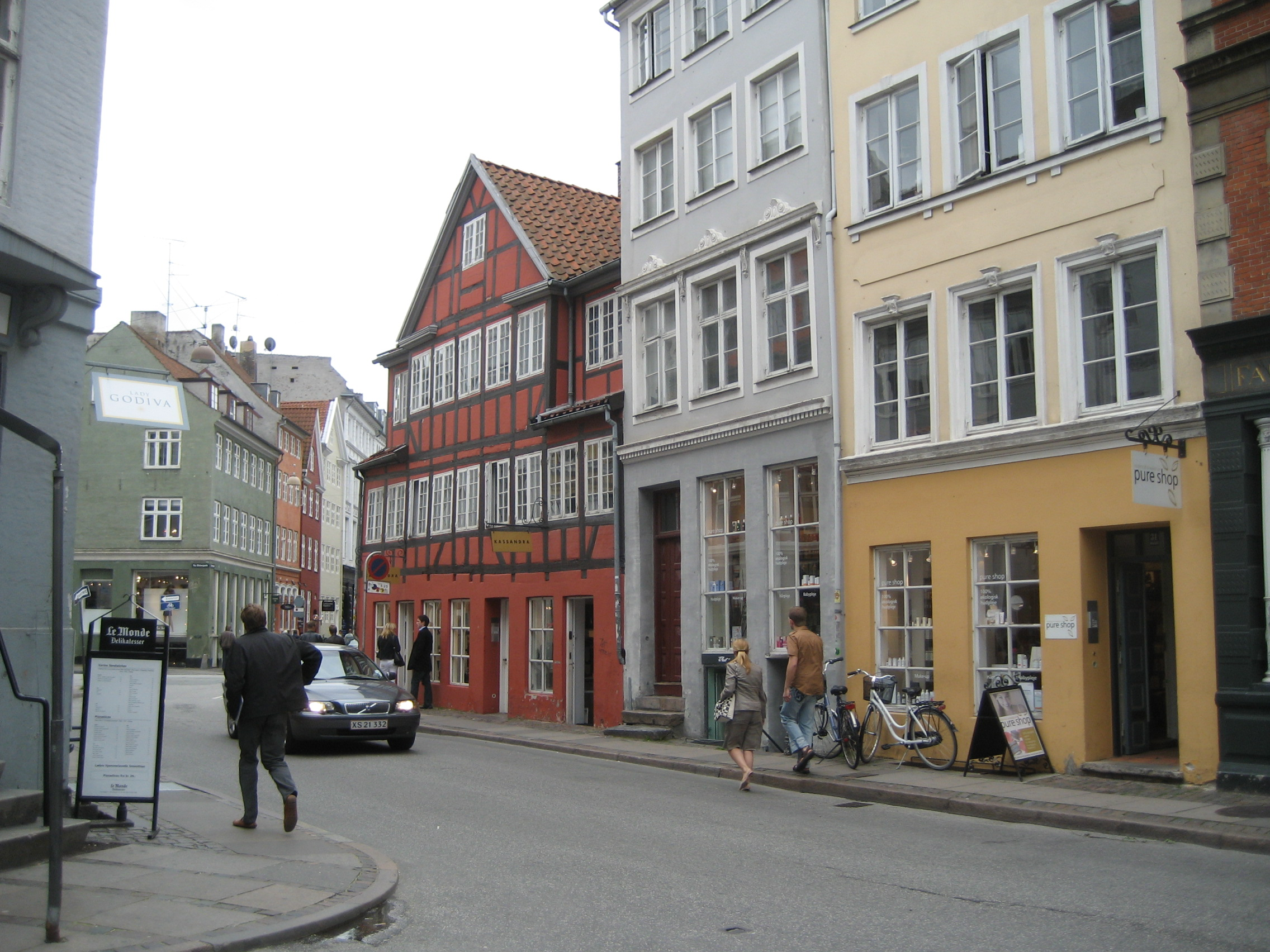 View